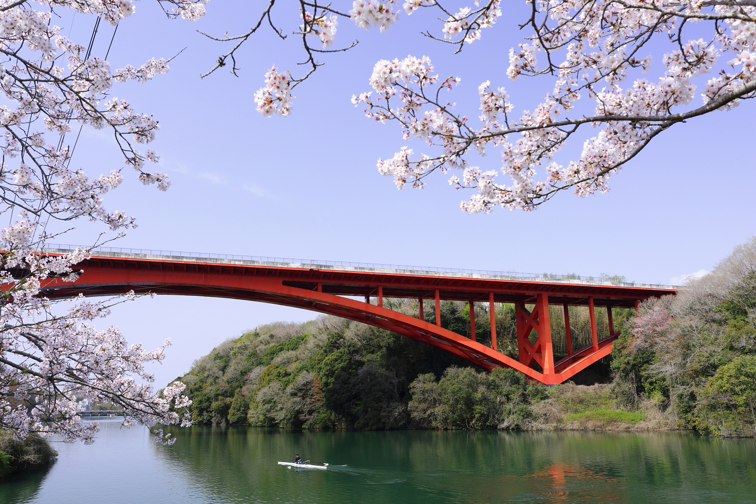 勘八峡（越戸ダム上流側付近、橋は東海環状自動車道の勘八橋）（豊田市、2018年（平成30年））